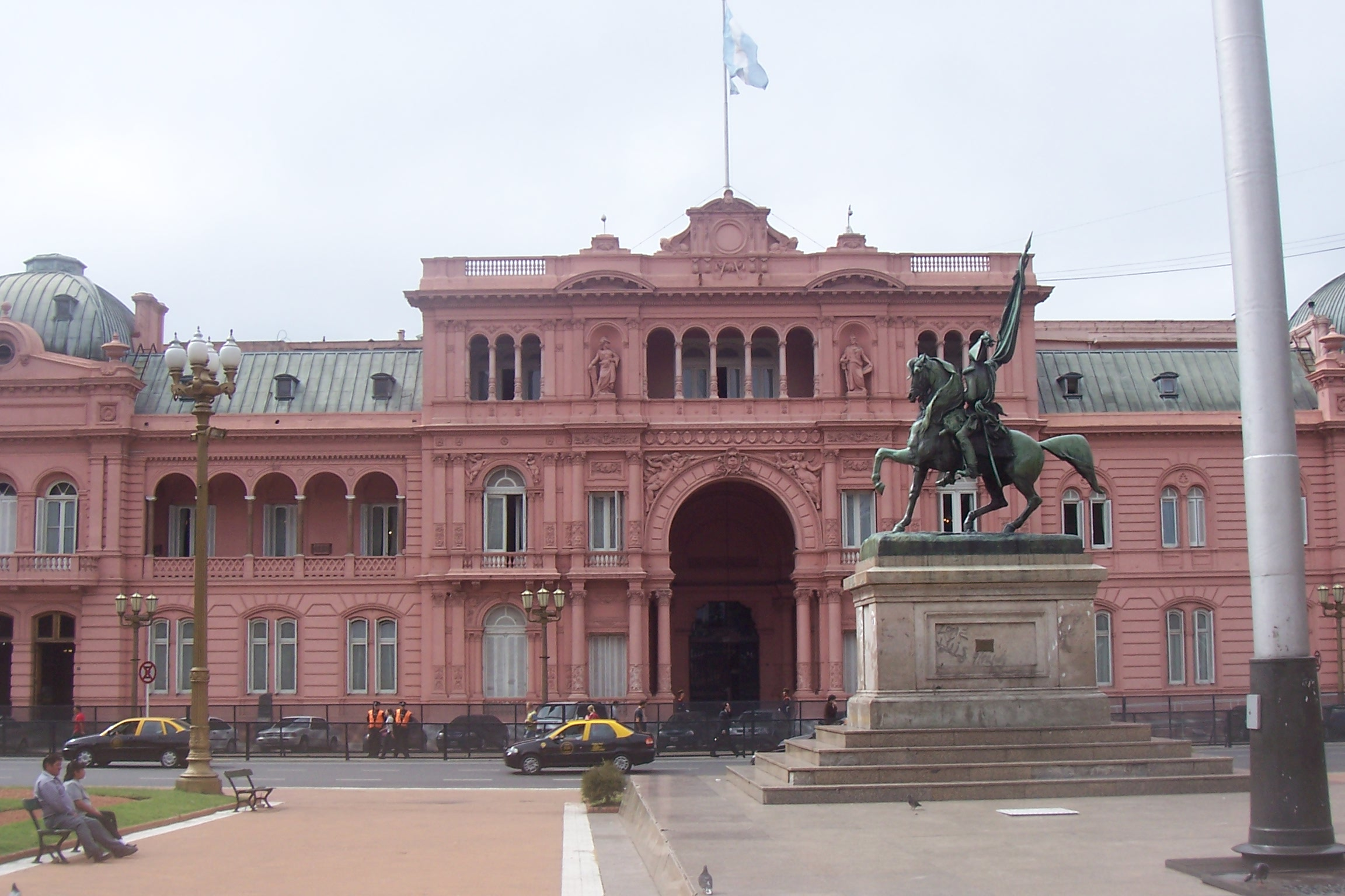 La Casa Rosada, sede del poder ejecutivo nacional argentino. Ciudad de Buenos Aires.